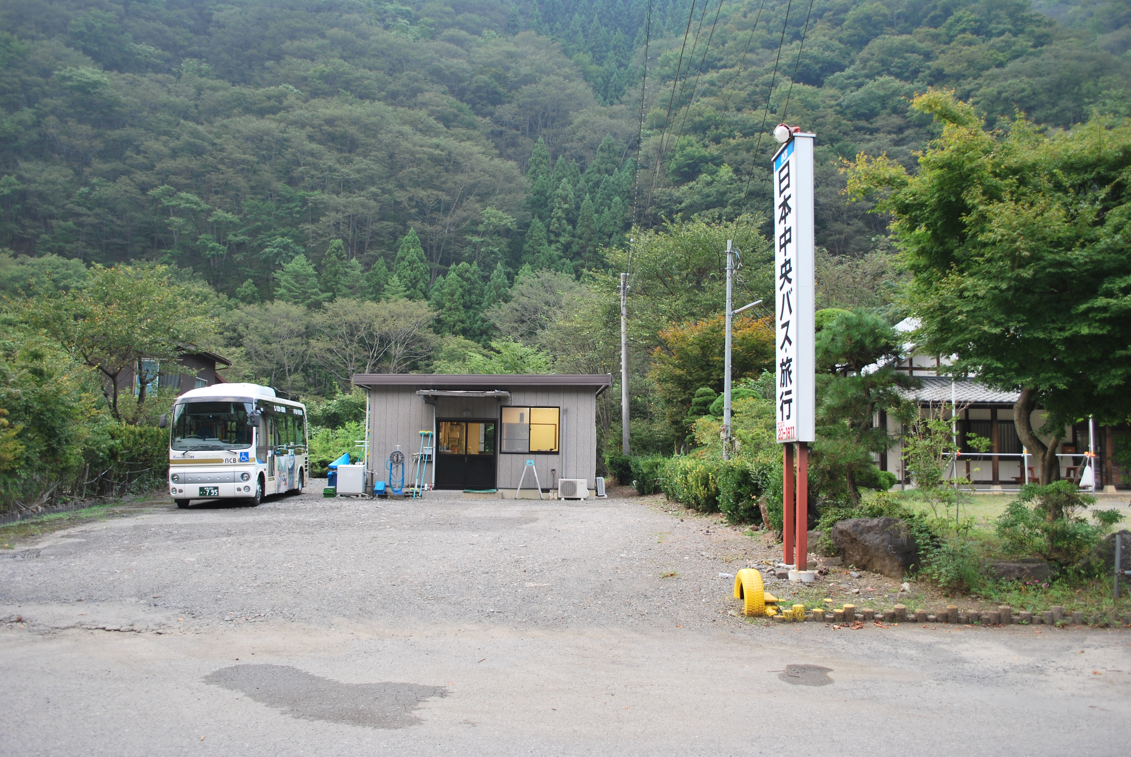 群馬県上野村にある日本中央バスの待機所。